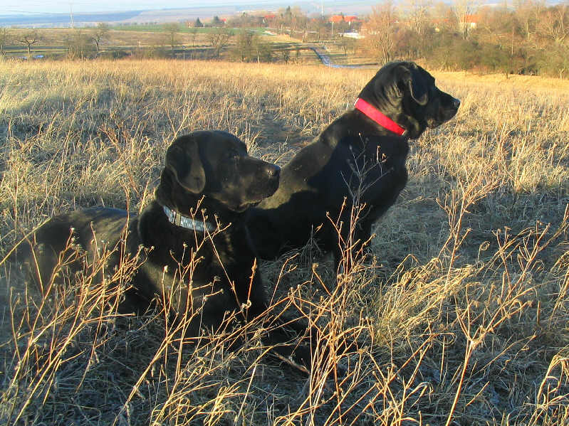 Labrador Retriever, Rüde(blaues Halsband), Hündin(rotes Halsband), fotografiert in Deutschland, Thüringen